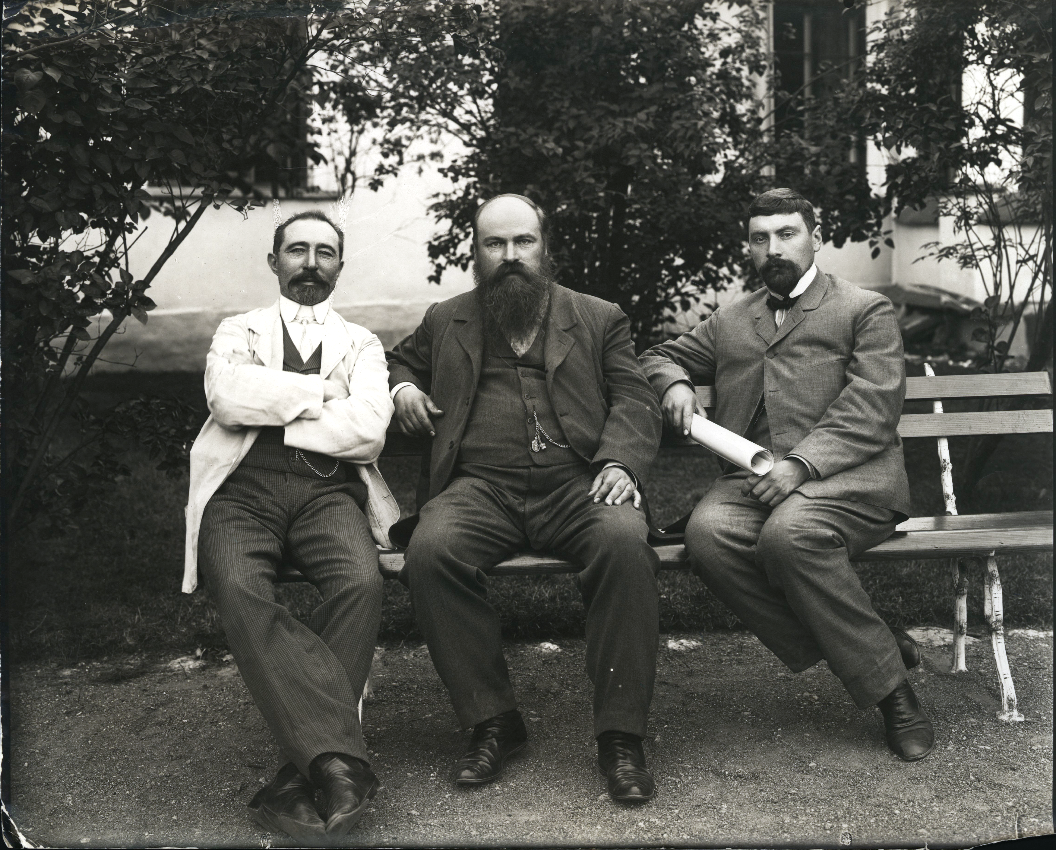 Депутаты Первой Государственной Думы: 1) Дитц, Якоб Егорович 2) Строганов, Василий Егорович 3) Ломшаков, Алексей Степанович